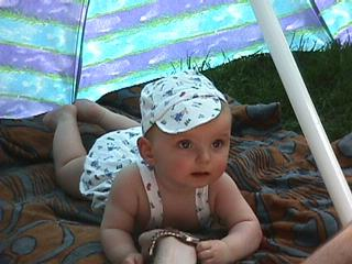 © M. Jastremski - valt onder de Creative Commons "Attribute" licentie